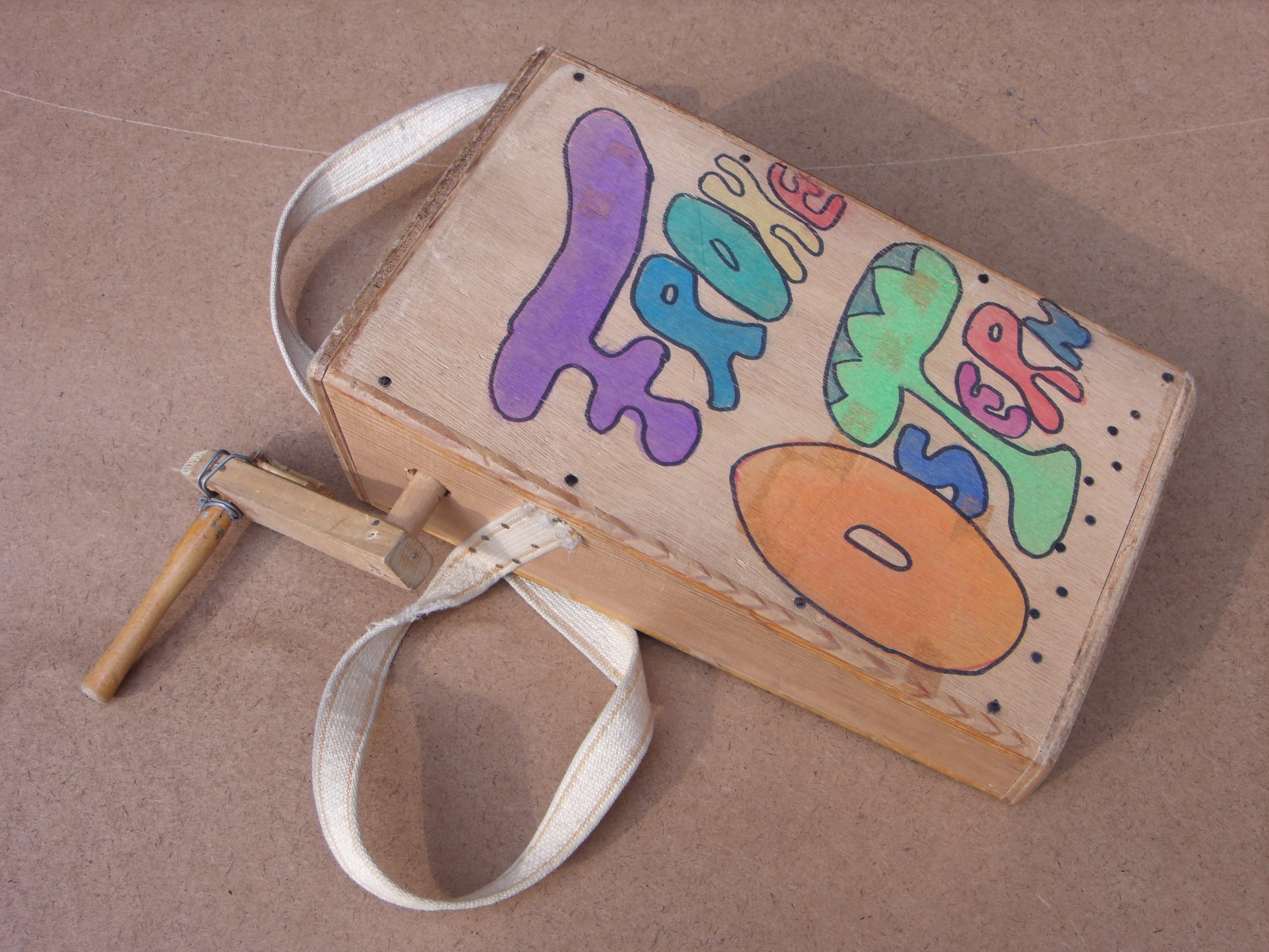 Eng Klibber aus den 1970er Joeren